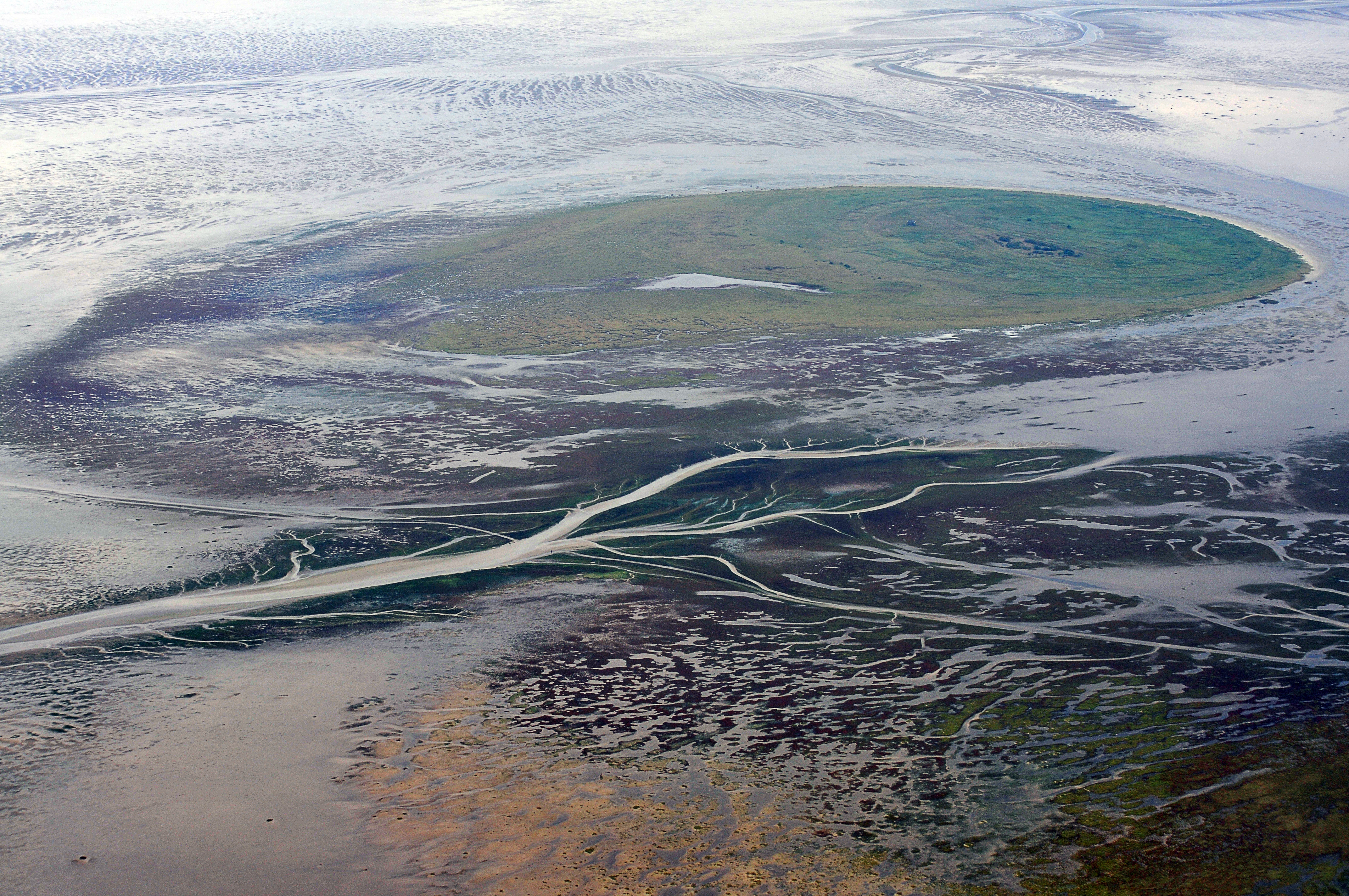 Fotoflug Nordsee, Nigehörn